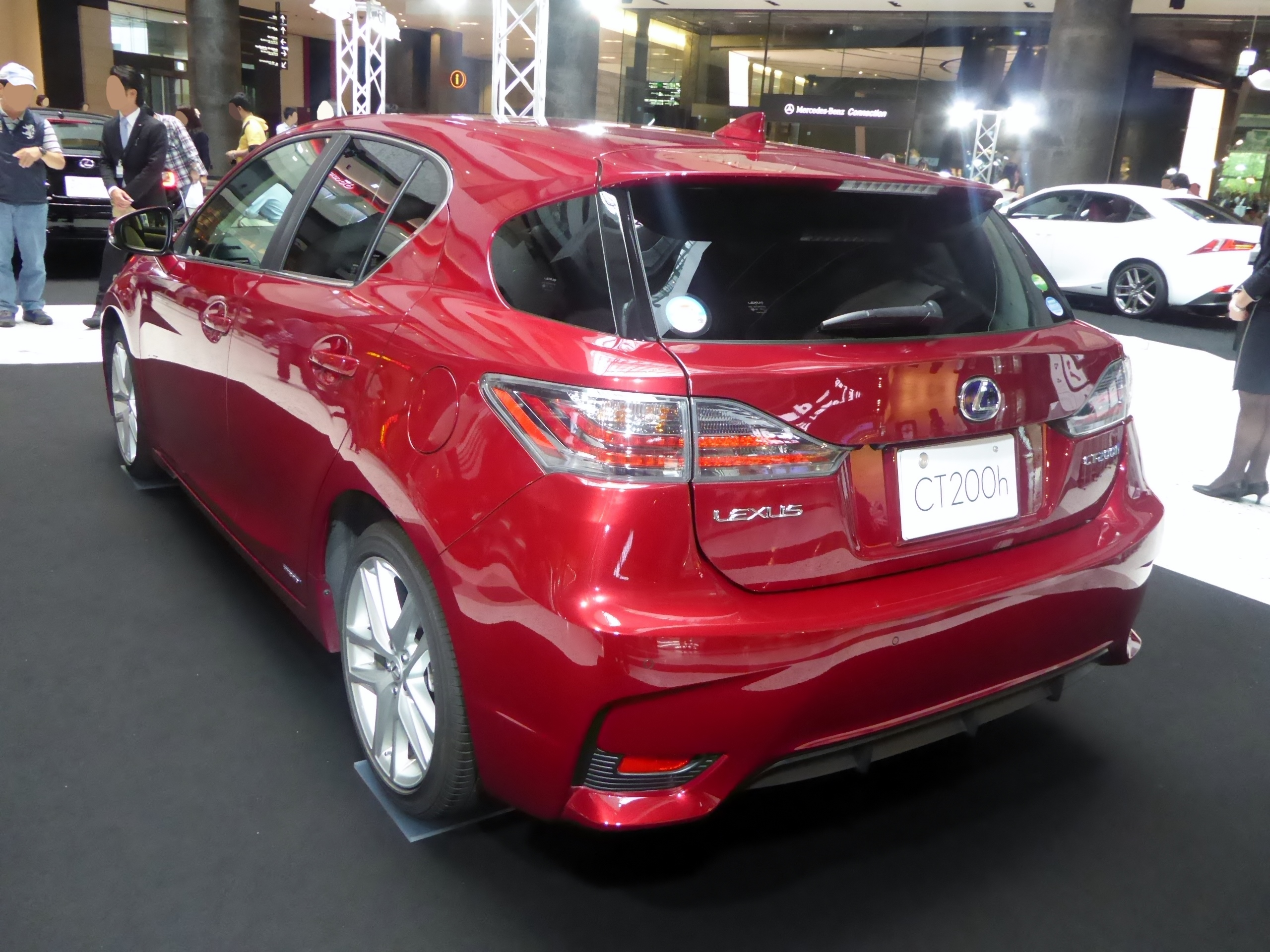 ZWA10型レクサス・CT200hをフロントから撮影。